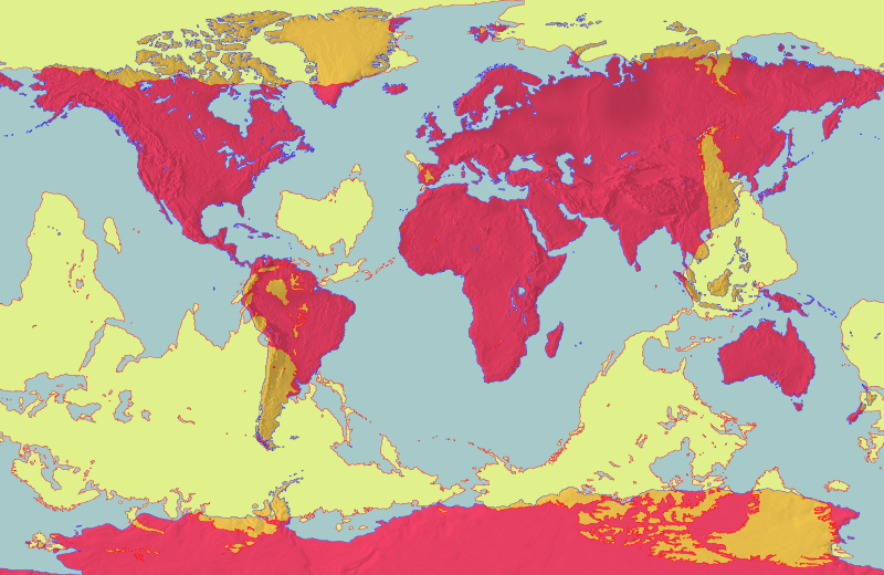 Mapa mundial de las antípodas. En rojo está el mapa real, y en amarillo las antípodas correspondientes. This map of the world is overlaid with a map showing the antipodes of each point.